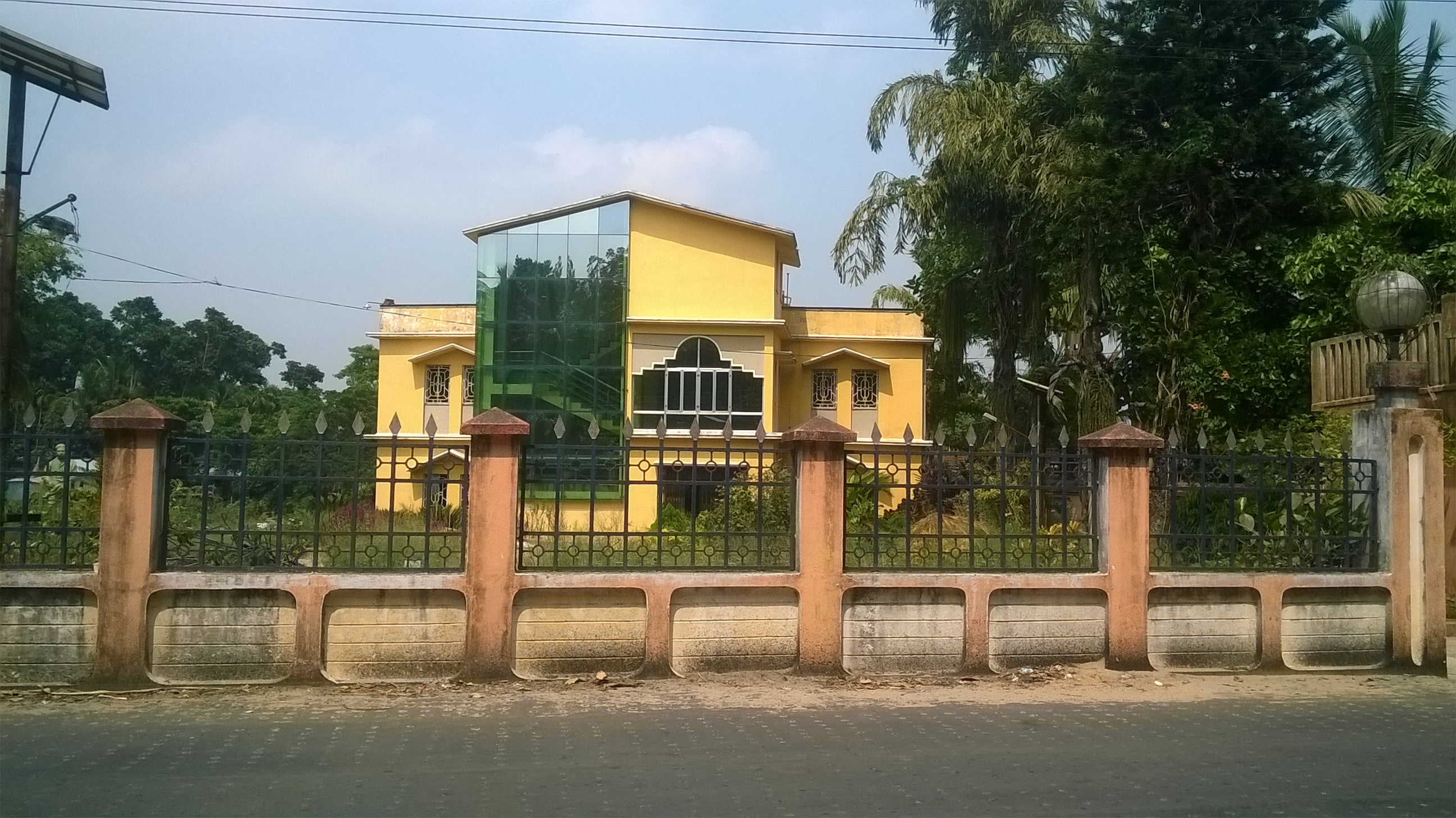 বিভূতিভূষন স্মৃতিঘাট, ব্যারাকপুর, বনগাঁ